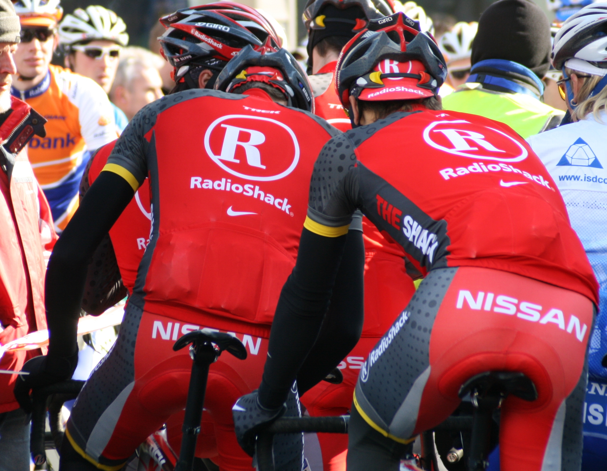 Deux coureurs de l'équipe Radioshack lors des Trois jours de Flandre occidentale 2010, à Torhout